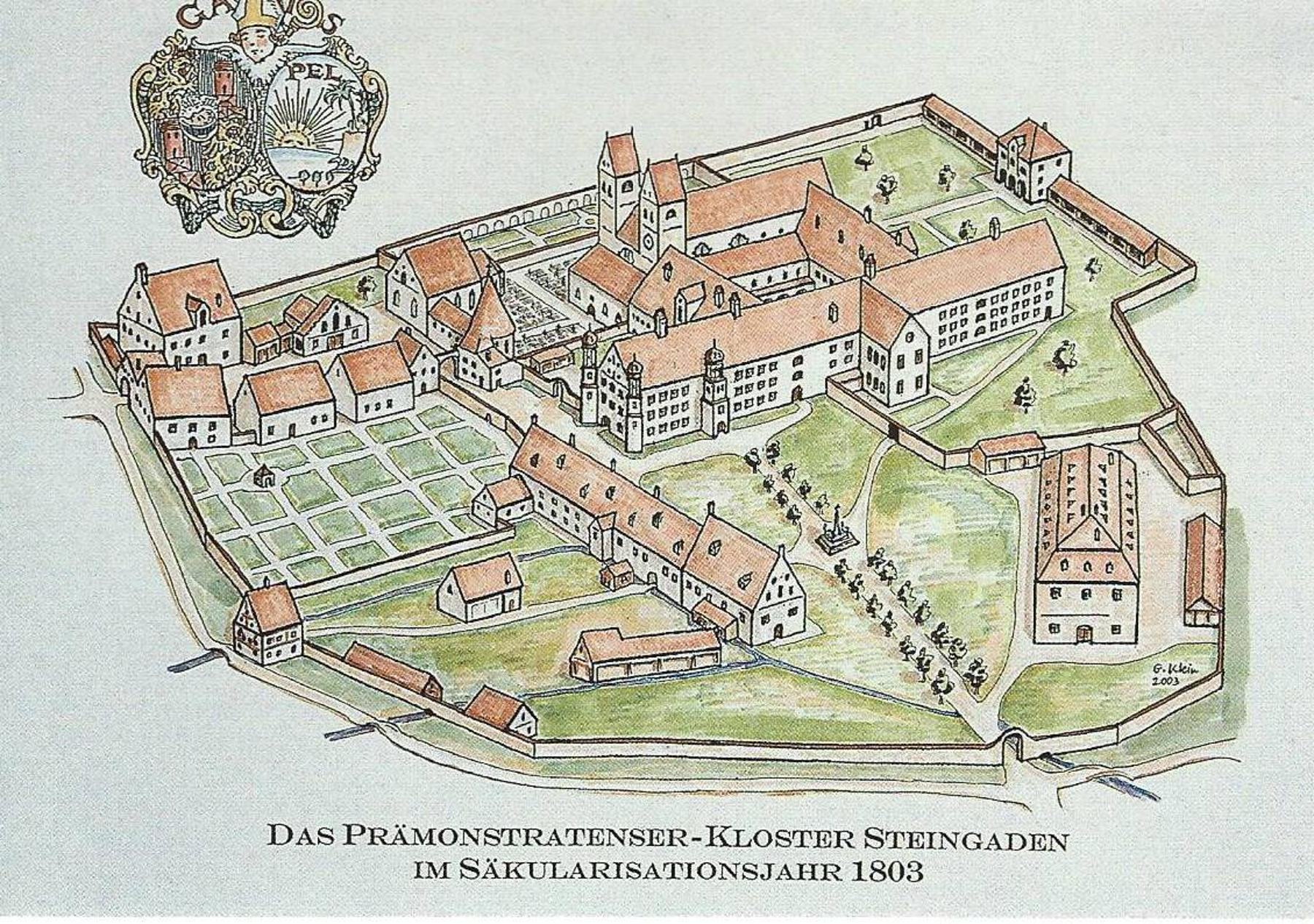 Steingaden, die Klosteranlage im Jahr 1803 vor den umfangreichen Abrissmaßnahmen im Zuge der Säkularisation